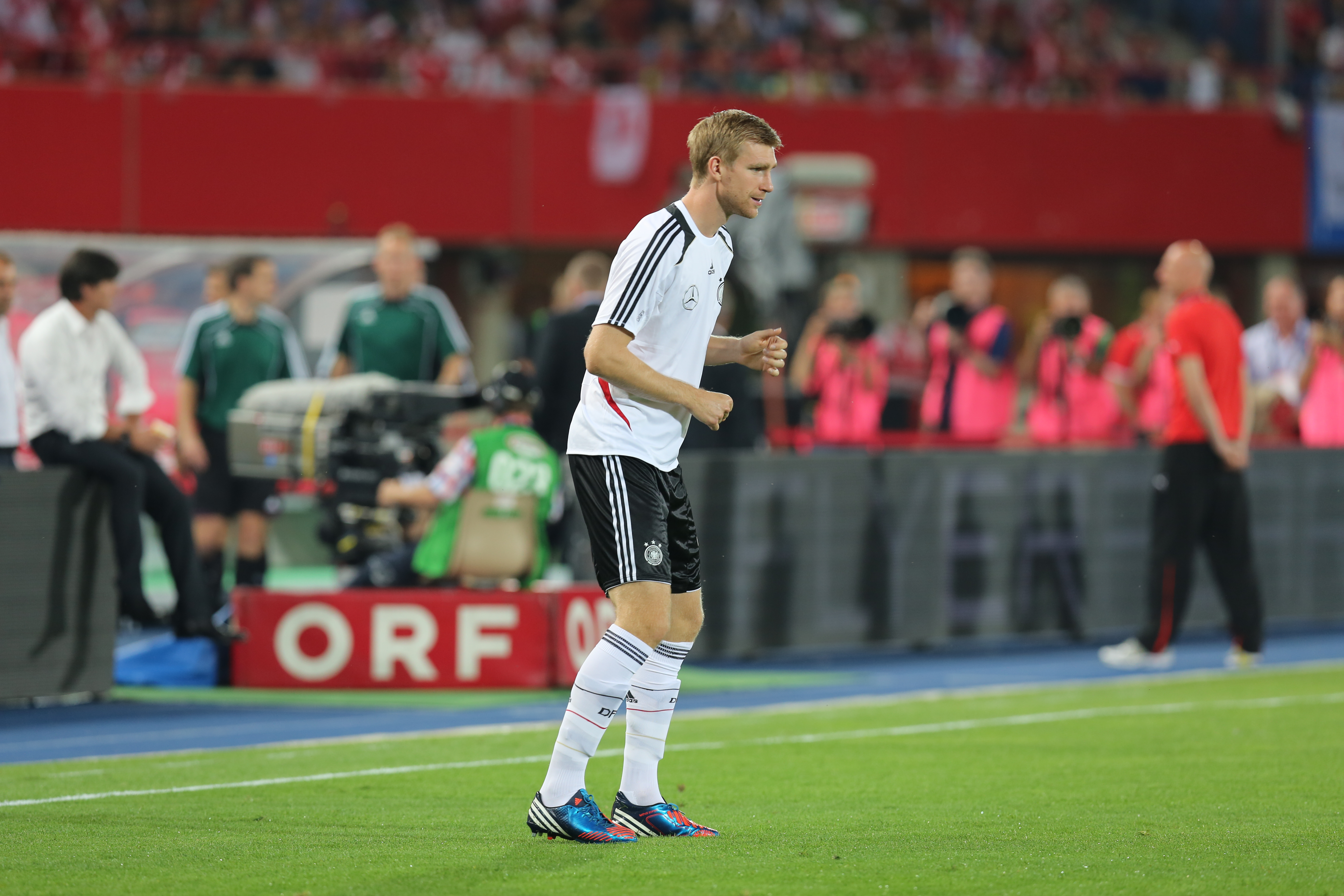 Fußball-Weltmeisterschaft 2014/Qualifikation (UEFA), Gruppe C, 11. September 2012, Österreich gegen Deutschland im Wiener Ernst-Happel-Stadion. The making of this work was supported by Wikimedia Austria. For other files made with the support of Wikimedia Austria, please see the category Supported by Wikimedia Österreich.